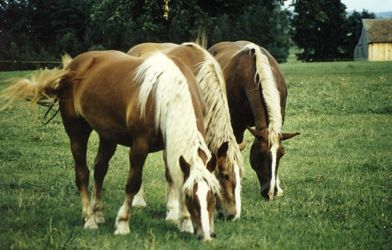 Süddeutsche Kaltblüter auf der Koppel Fotografiert Sommer 1993 in Oderding Fotograf: Rumo